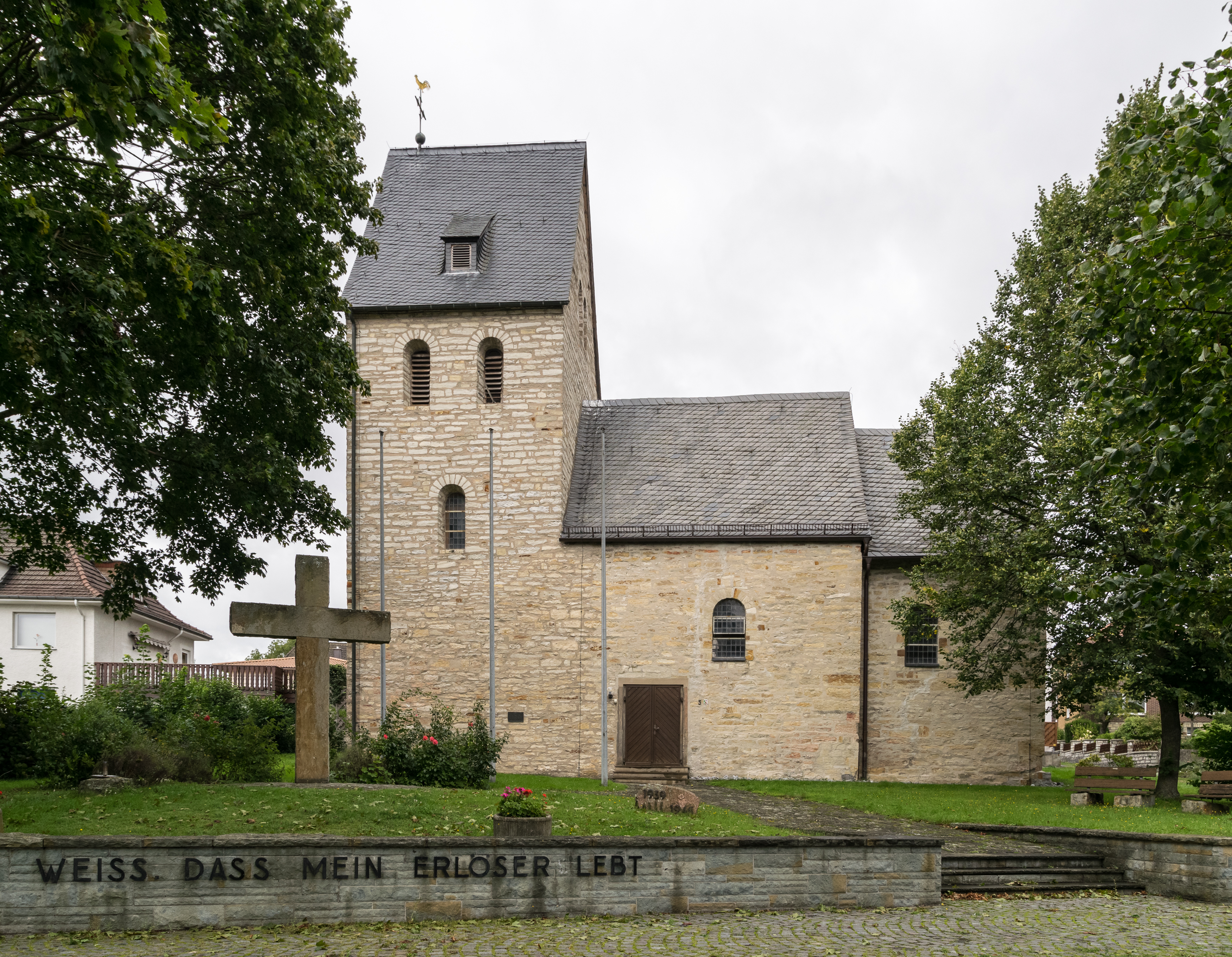 Alte Pfarrkirche St. Walburga in Borchen-Alfen